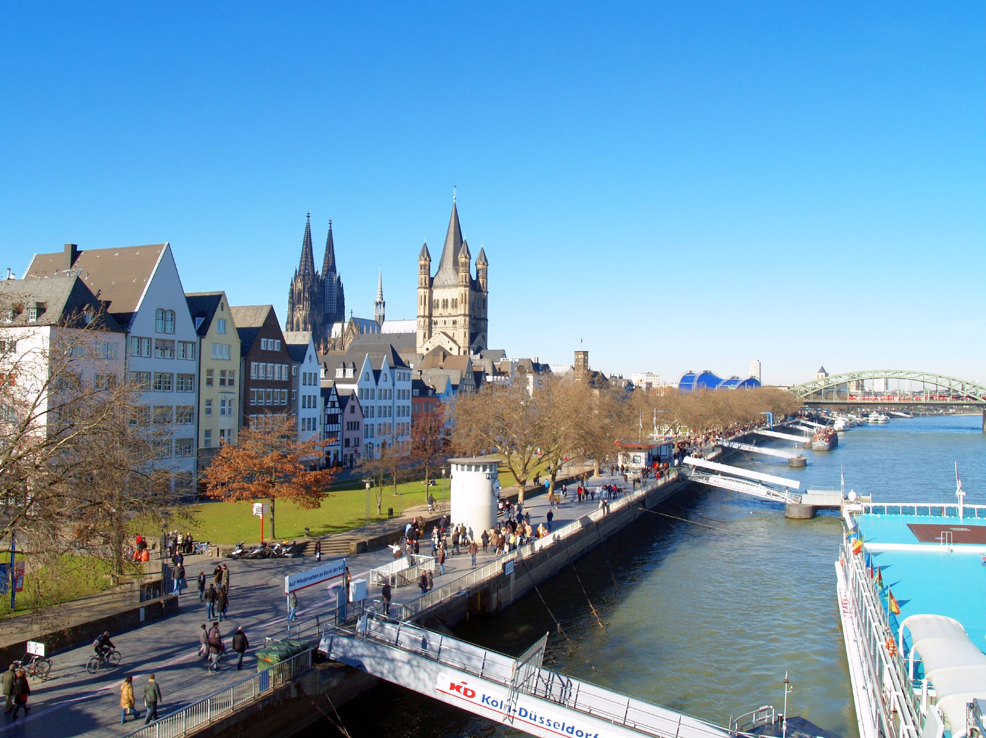 Köln und seine Altstadt, A view on cologne